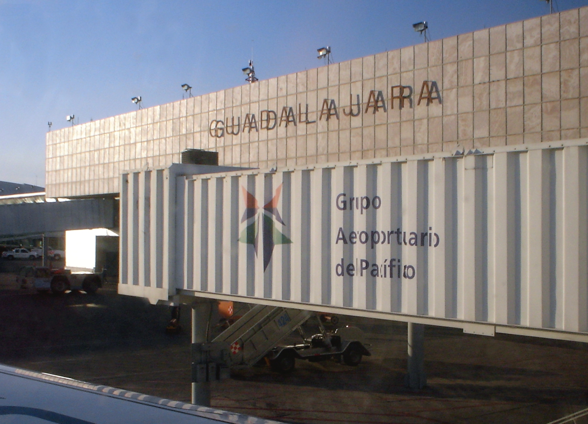 Zona Aire del Aeropuerto de Guadalajara